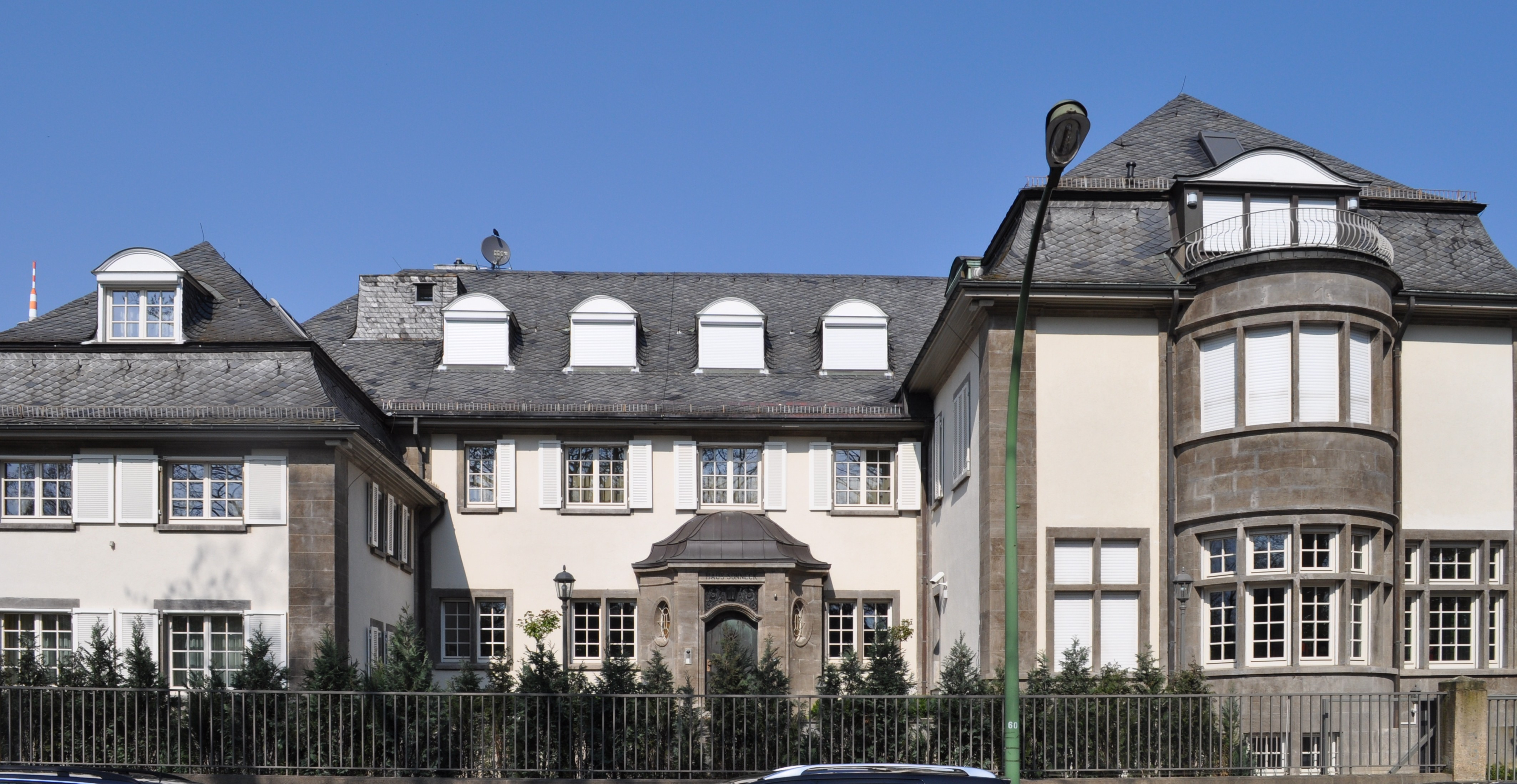 Denkmalgeschütztes Haus Zeppelinallee 38, "Haus Sonneck"